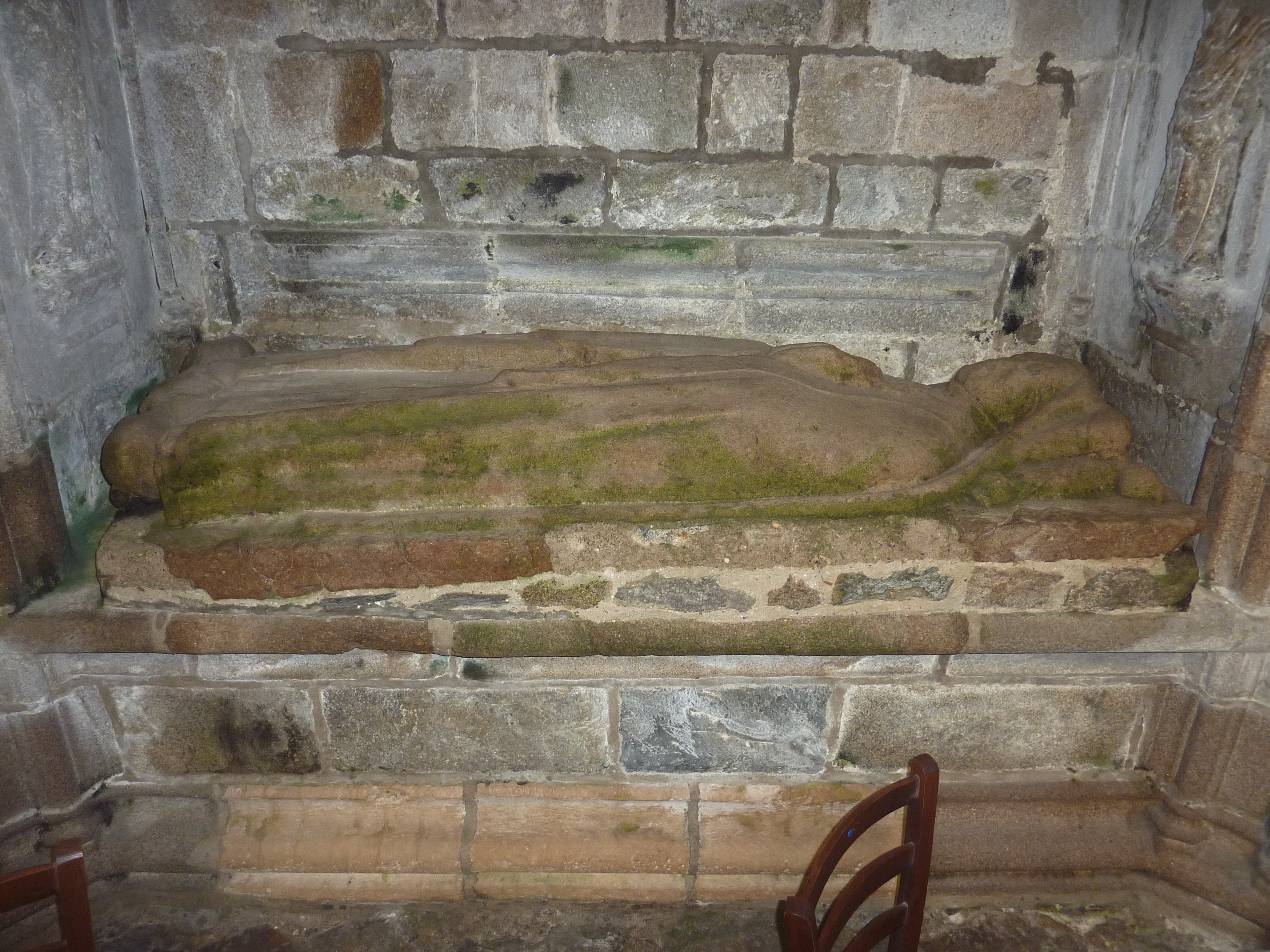 Cathédrale Saint-Tugdual de Tréguier : enfeu de Jean de Lantillac, chanoine de Tréguier, archidiacre de Plougastel, décédé en 1461.